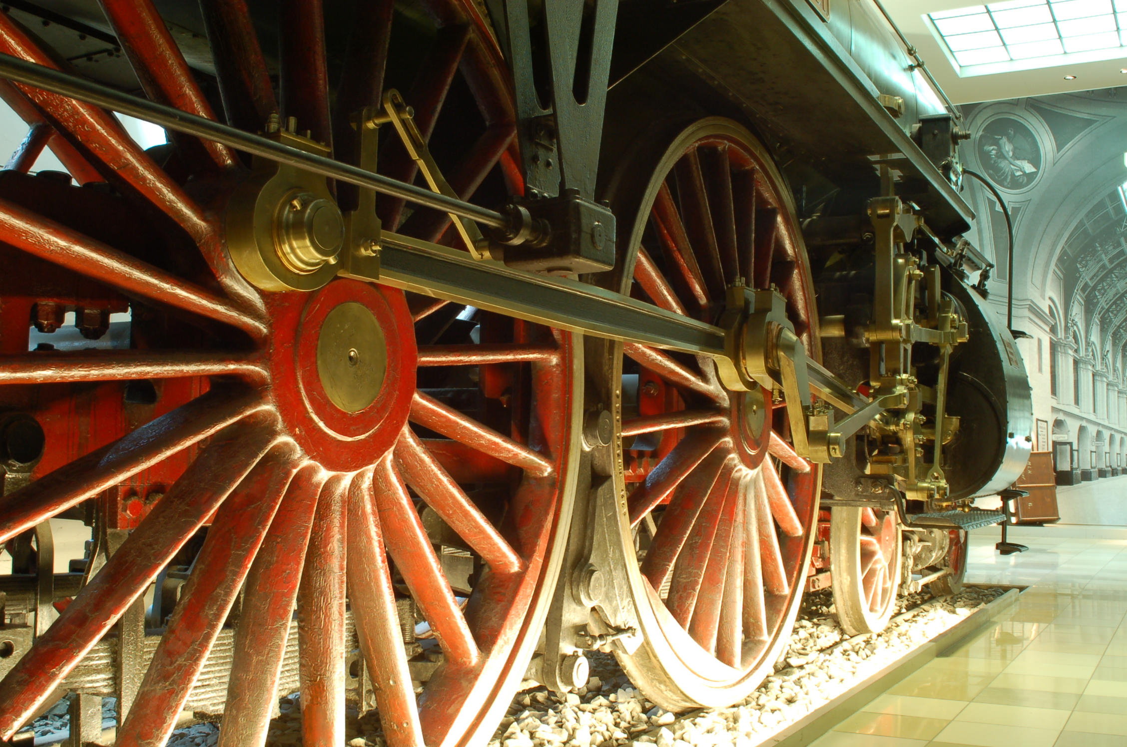 Triebwerk der Lokomotive S 2/6 im Verkehrsmuseum Nürnberg